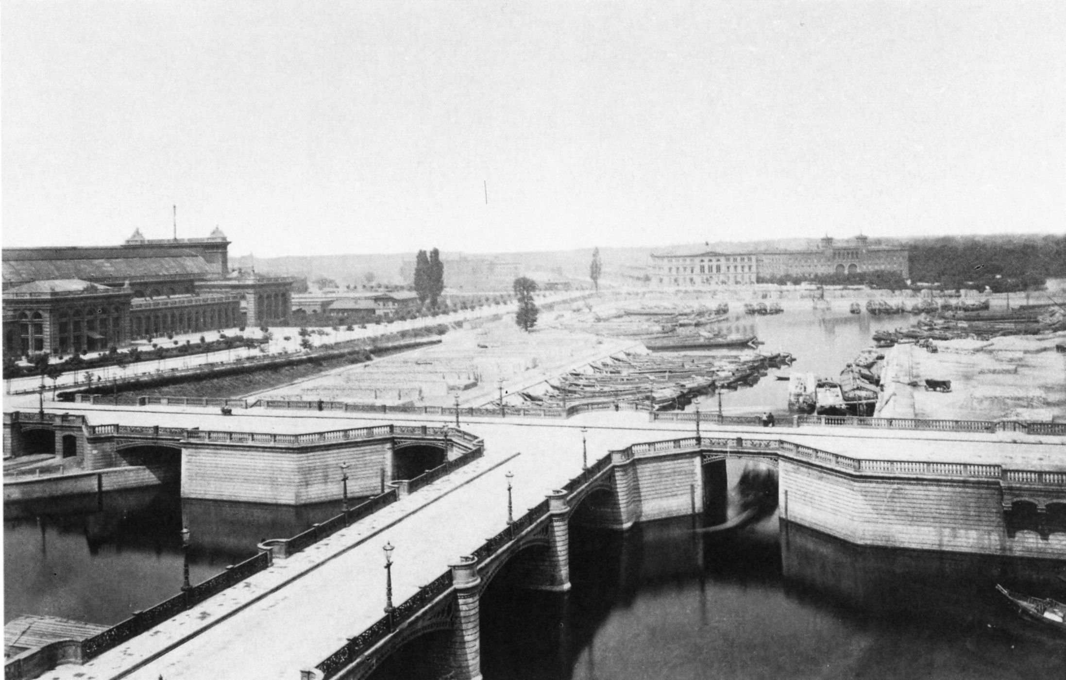 Alsenbrücke über die Spree und die Zufahrt zum Humboldthafen in Berlin